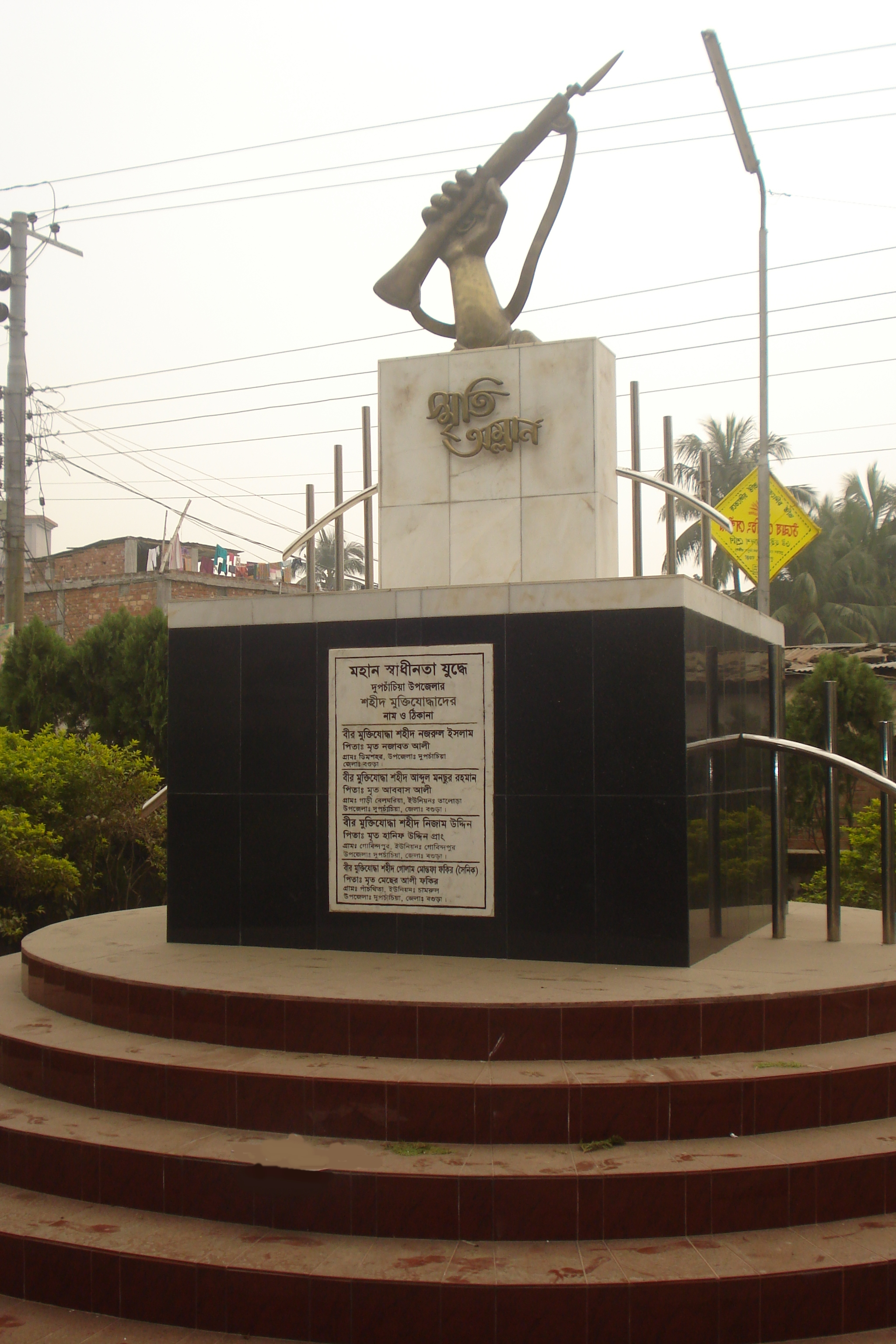 স্মৃতি অম্লান, দুপচাঁচিয়া, বগুড়া